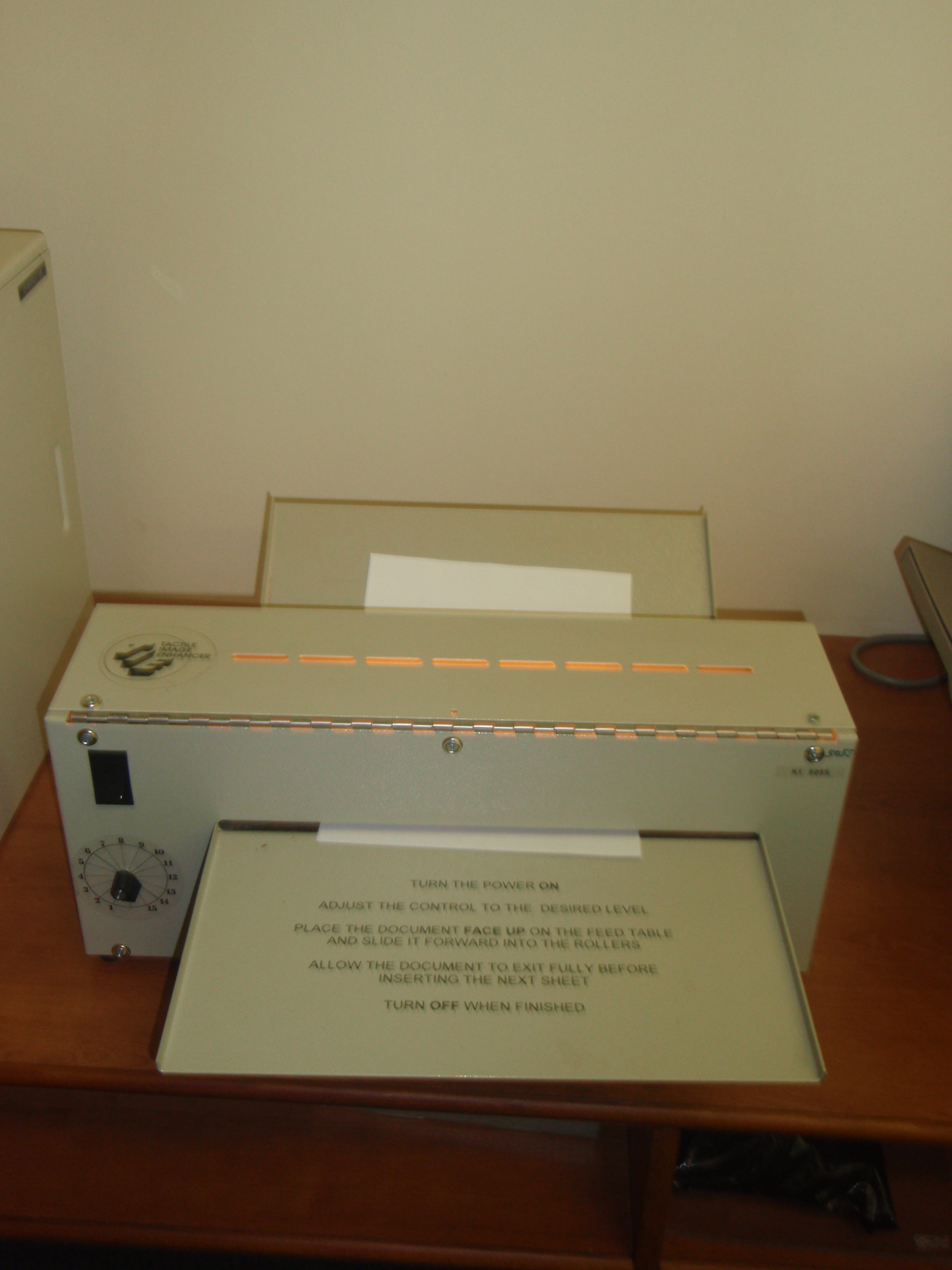 Fuser, tvorba reliéfního obrázku z předlohy.